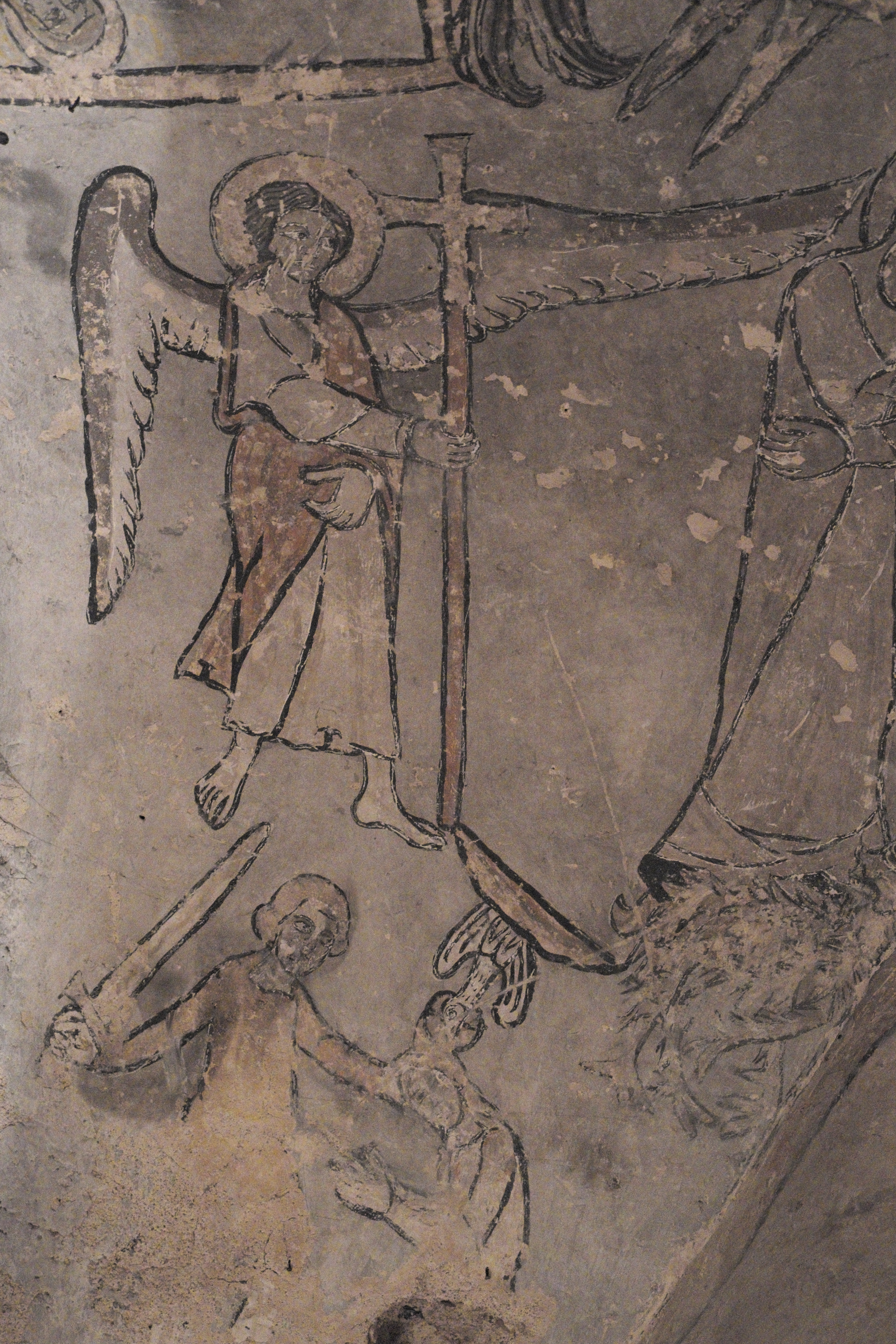 Katholische Pfarrkirche, ehemalige Stiftskirche, Saint-Cerneuf in Billom im Département Puy-de-Dôme (Auvergne-Rhône-Alpes), Krypta vermutlich aus dem Ende des 11. Jahrhunderts, Tempera-Malerei aus dem Ende des 12. Jahrhunderts; Darstellung: Legende der heiligen Margareta von Antiochia